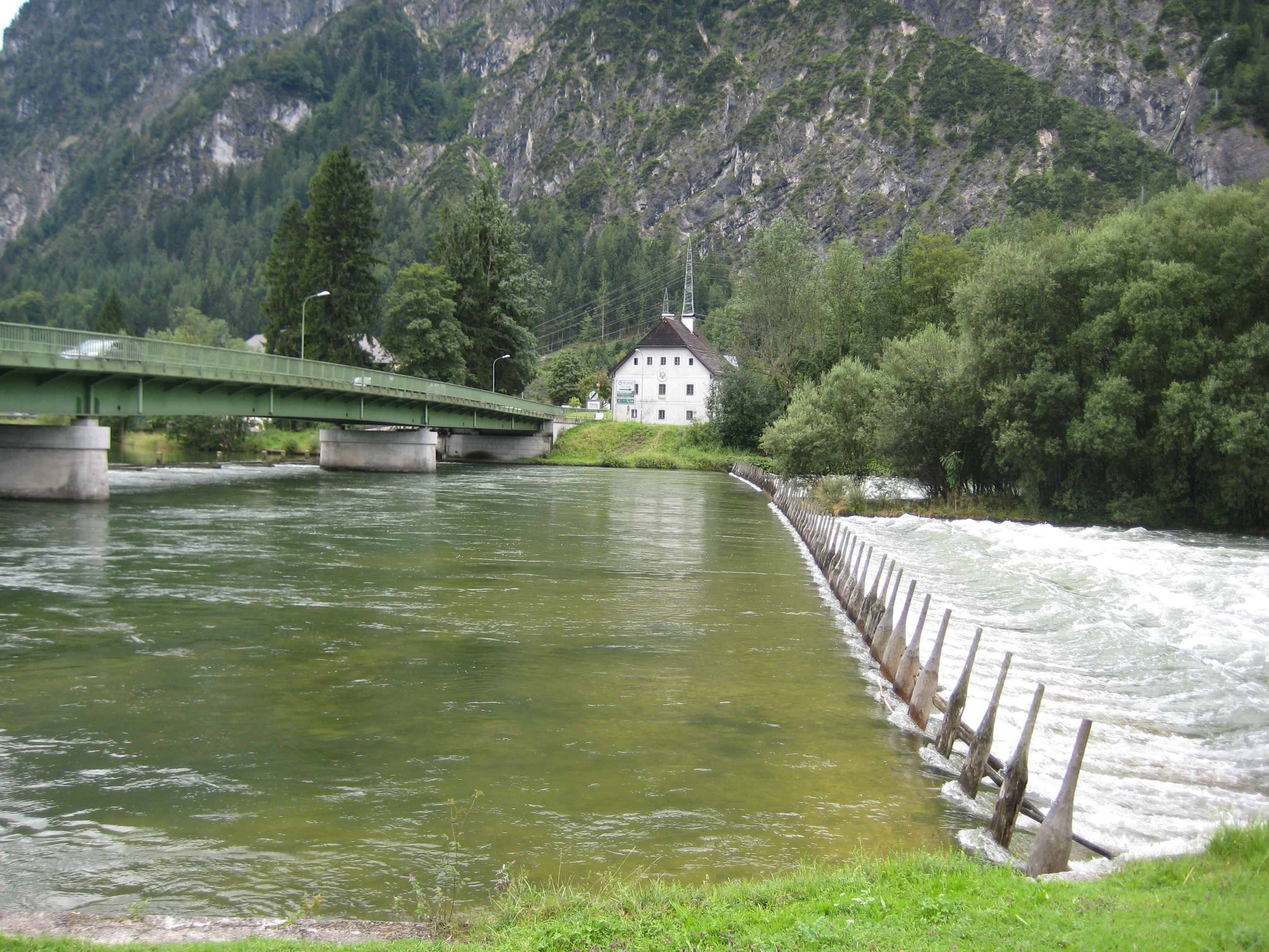 Steeger Seeklause samt Klauswärterhaus